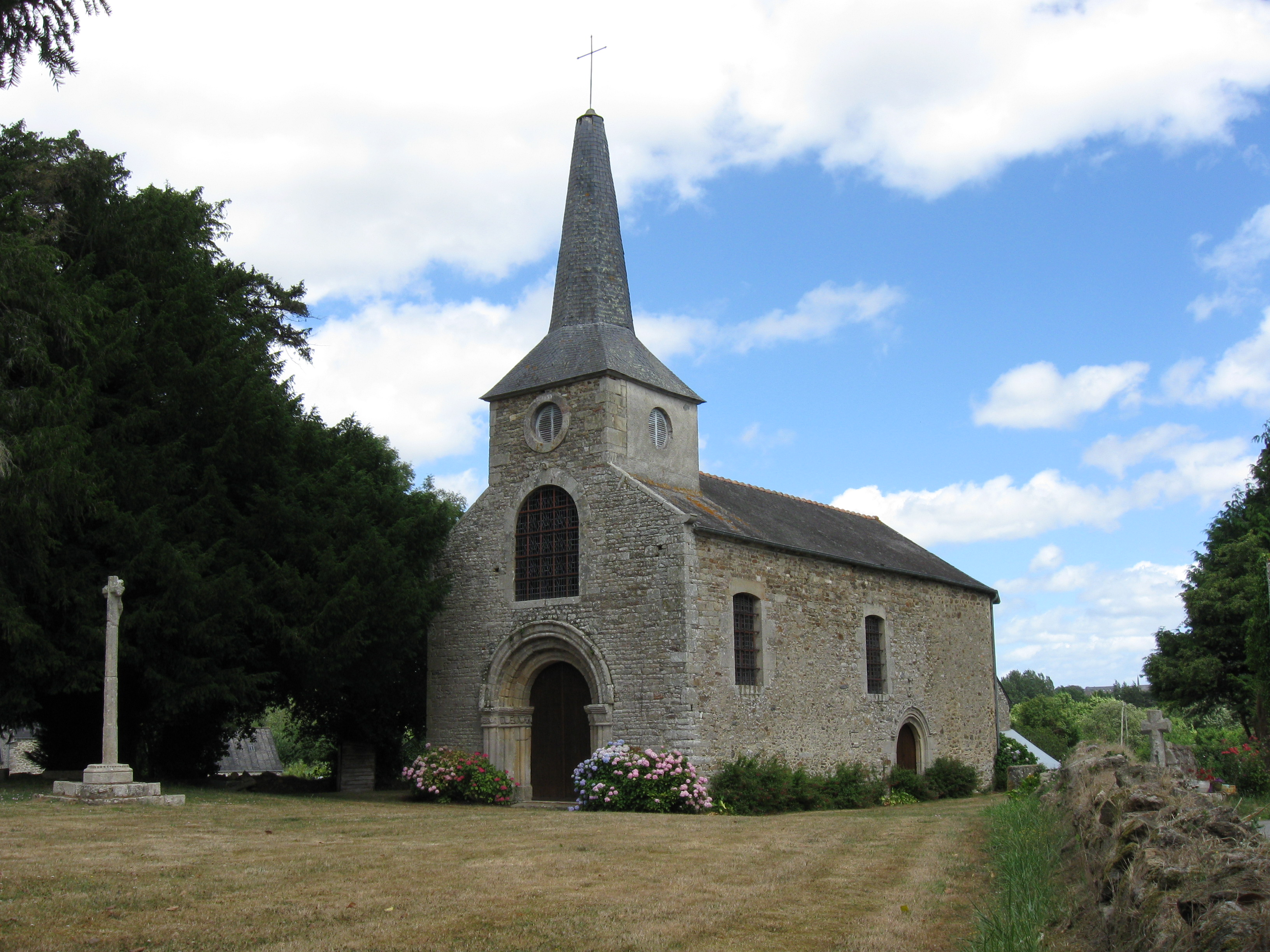 Ancienne église paroissiale de Saint-Lormel. (commune de Saint-Lormel, département des Côtes-d'Armor, région Bretagne).